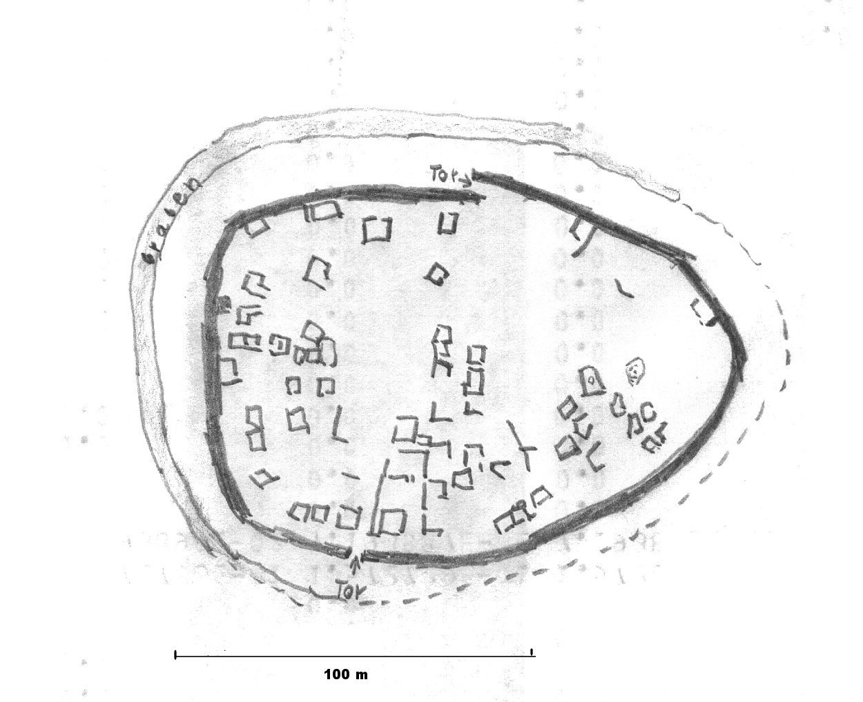 Heidenlöcher bei Deidesheim, Grundriss-Skizze